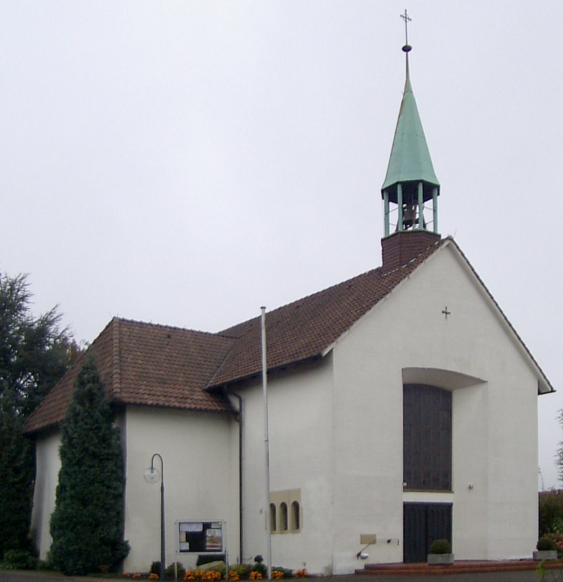 Römisch-katholische Kirche Maria Frieden in Lienen.